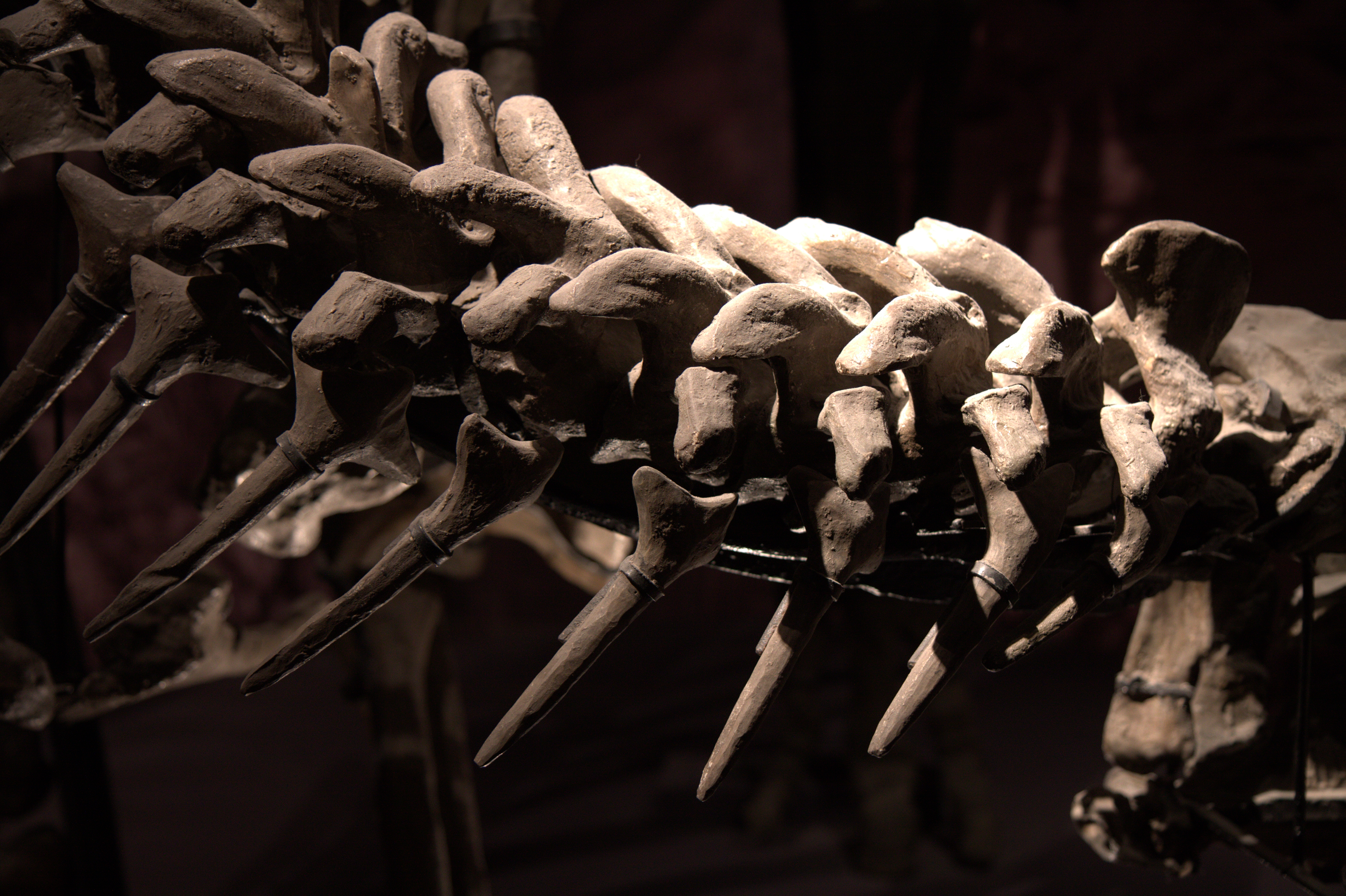 Daté entre 75 et 68 millions d'années, ce squelette incomplet a été découvert en Chine. The making of this document was supported by Wikimédia France. (Submit your project!)